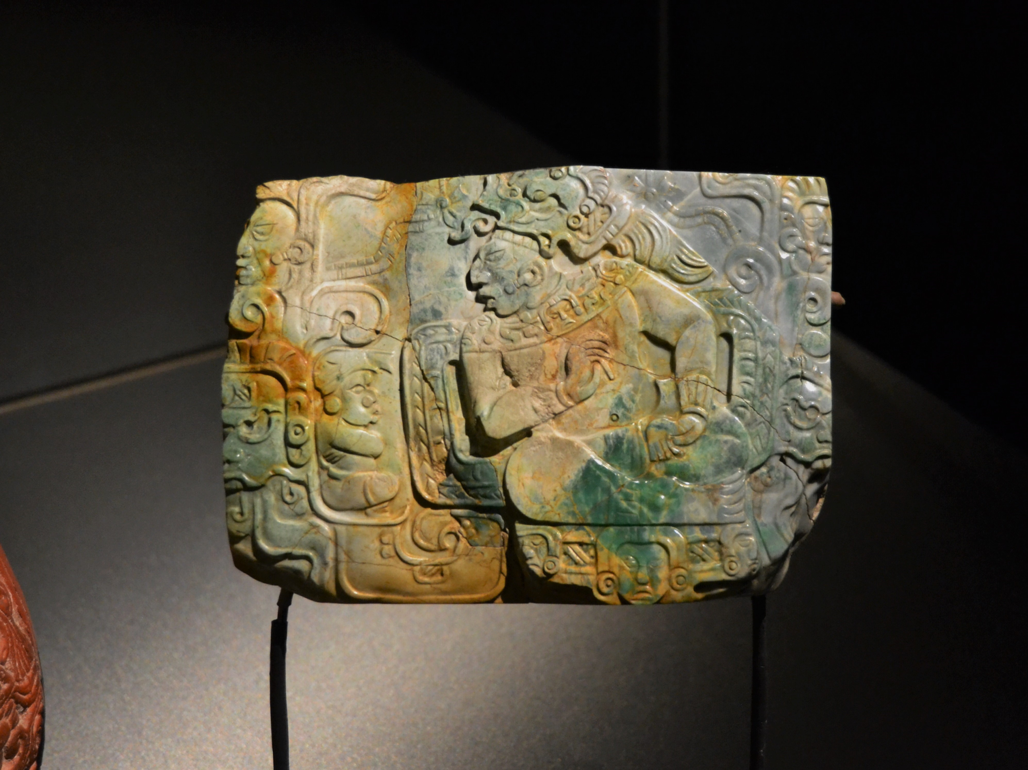 Placa de jade, Nebaj. Període clàssic tardà (600-800). Museu Nacional d'Arqueologia i Etnologia, Guatemala. Exposició Maies. L'enigma de les Ciutats Perdudes del museu arqueològic d'Alacant. Es mostra a un governant assegut amb les cames encreuades sobre el seu tron parlant amb una persona que pateix nanisme. Per ambdós costats del tron creixen plantes de dacsa, flanquejades en la seu part inferior pels caps de K'awiil i el déu del Panís, probablement representants d'avantpassats difunts.